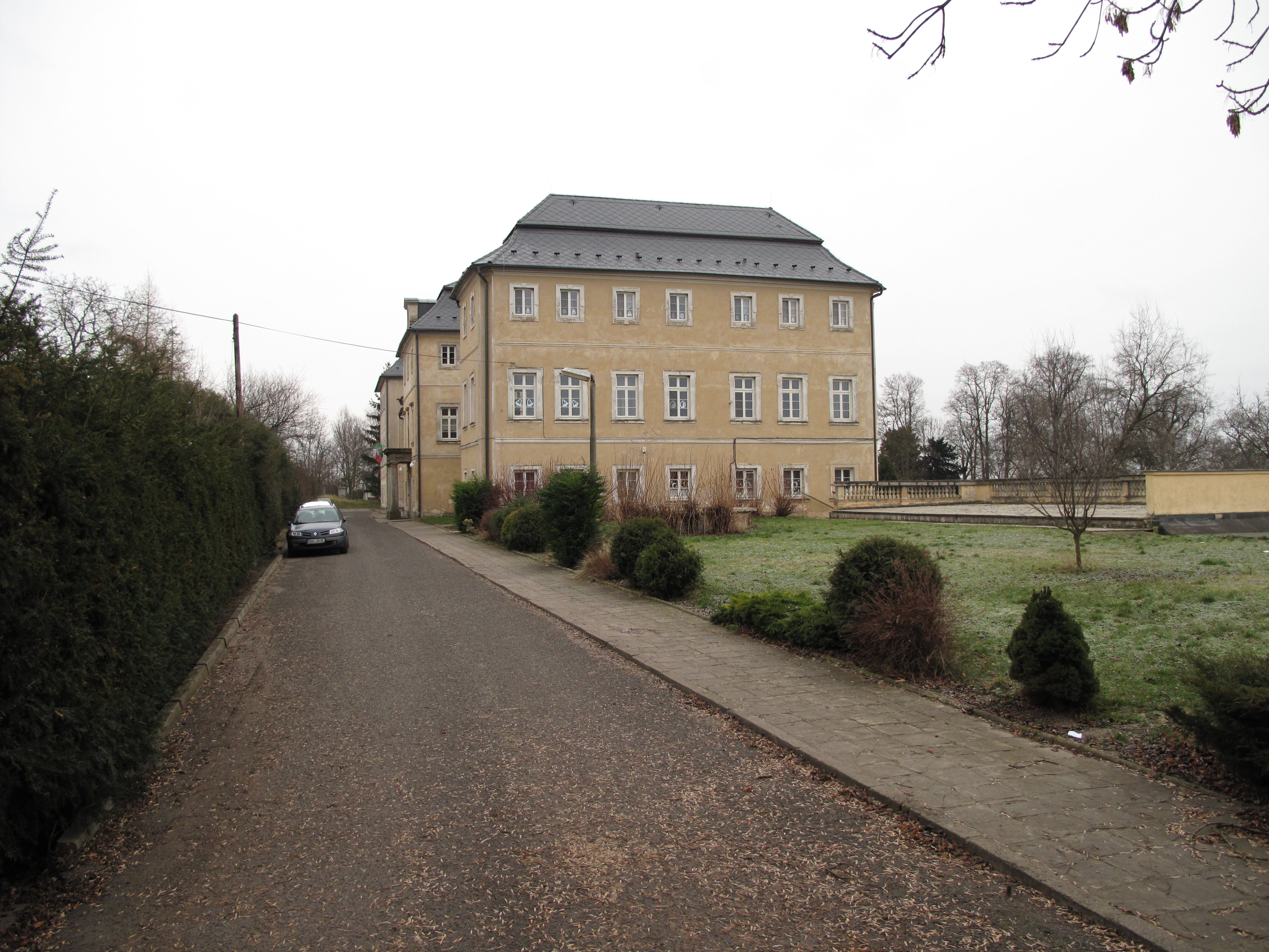 Dětský domov v Dlažkovicích. Okres Litoměřice, Česká republika.